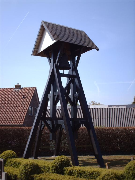 Klokkenstoel in Boijl